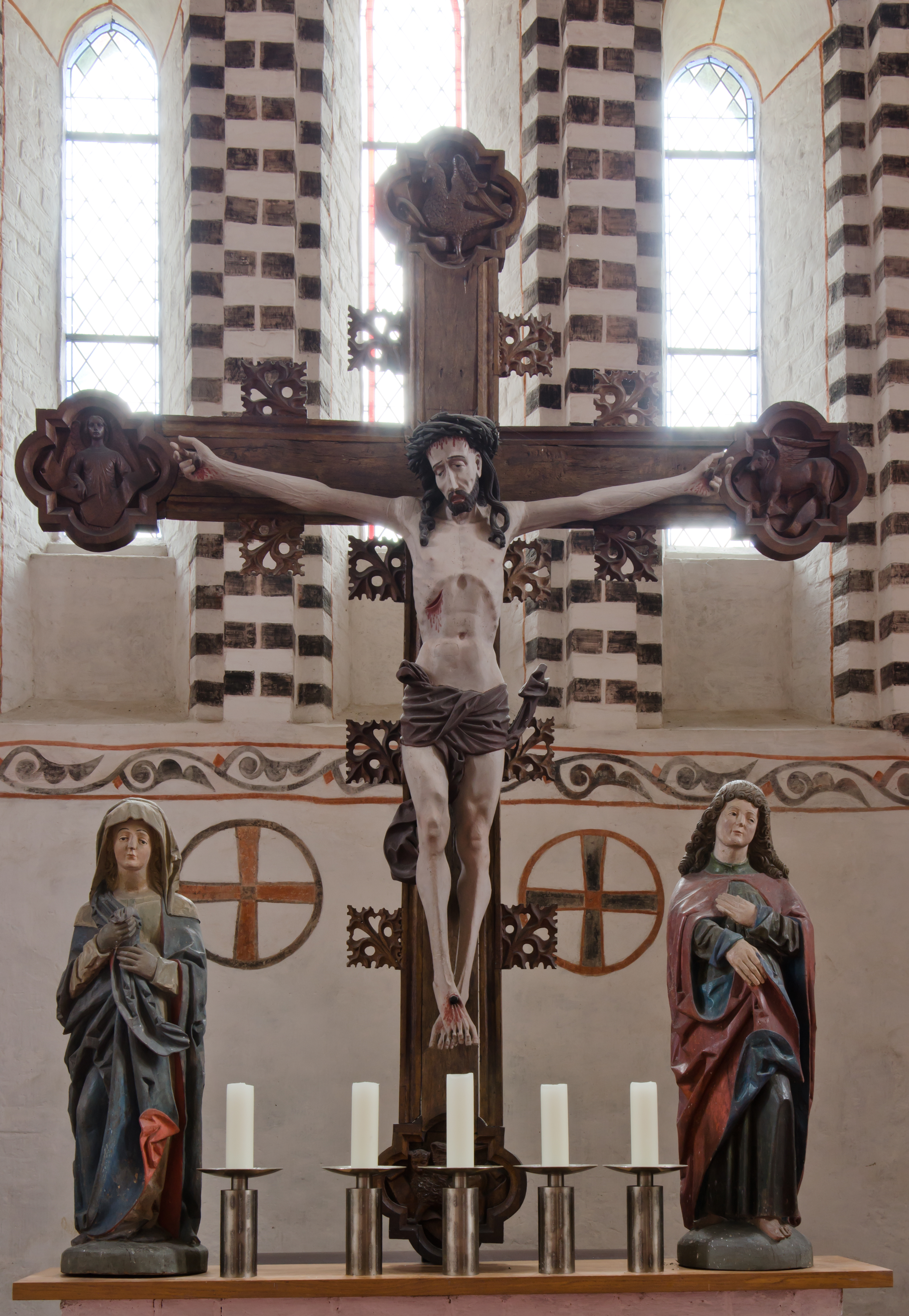 St.Godehard Kessin Altar